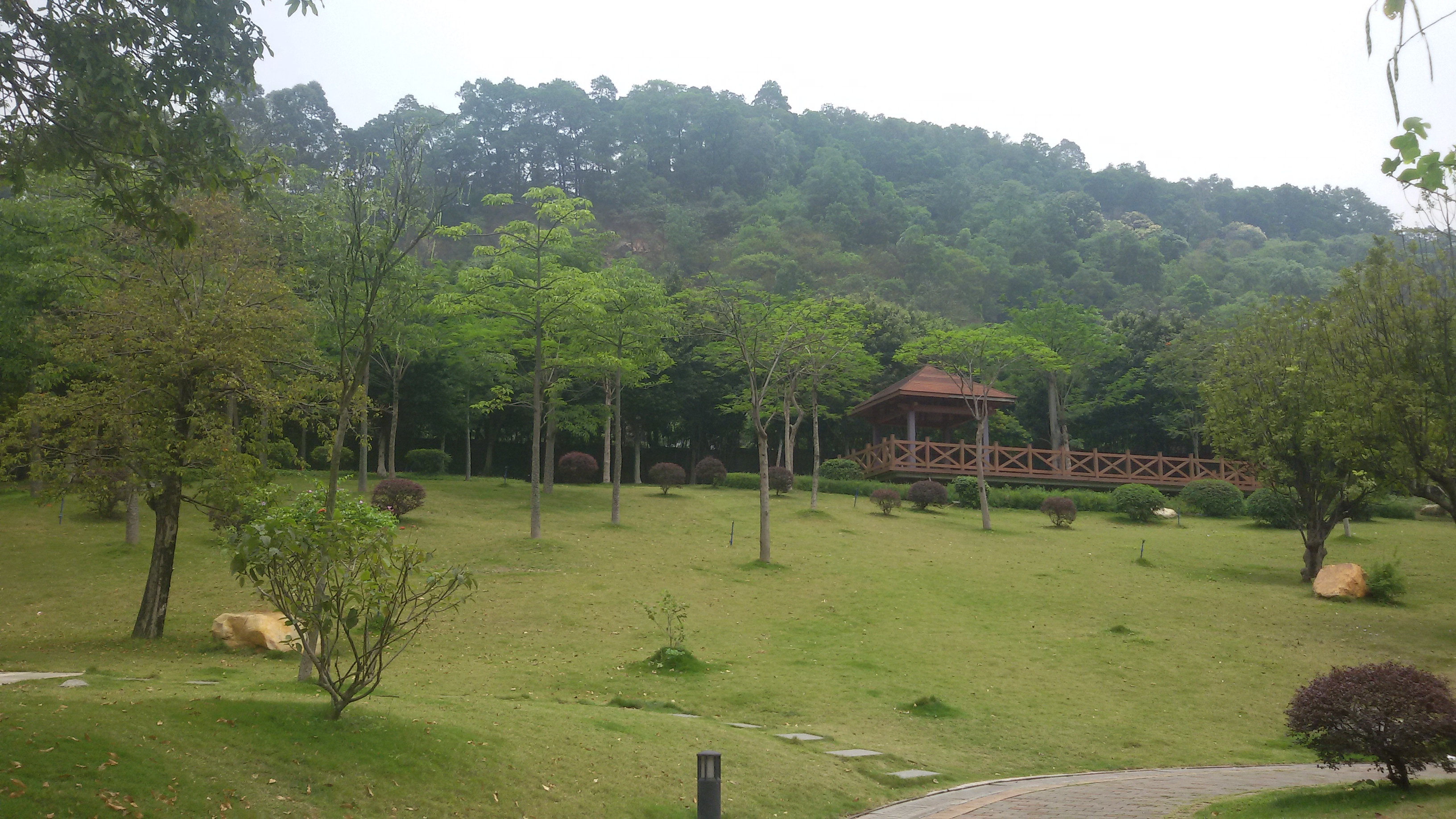 粵語: 廣州市天河區燕嶺公園南邊